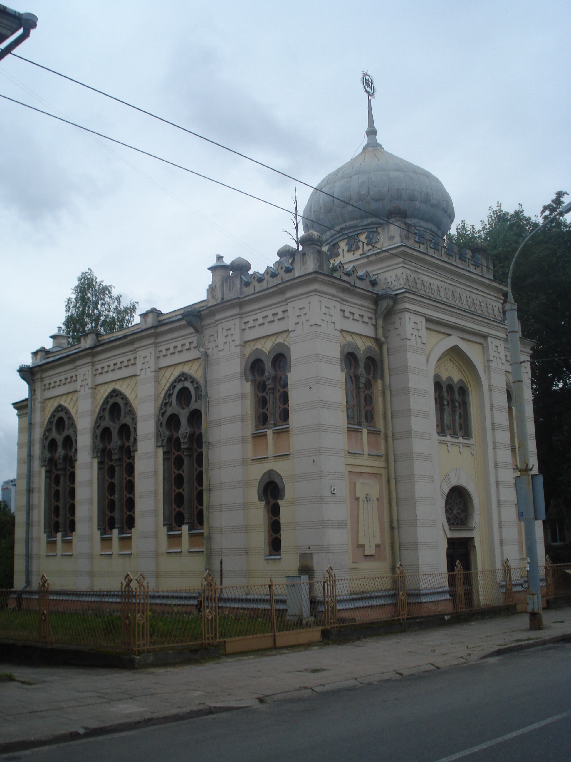 Karaite kenesa in Vilnius, Lithuania